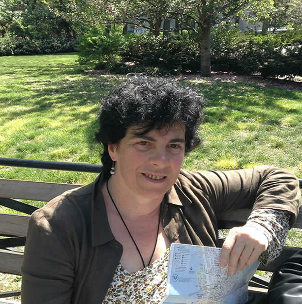 Tere Irastortza idazlearen argazkia. Egilea: F. M.